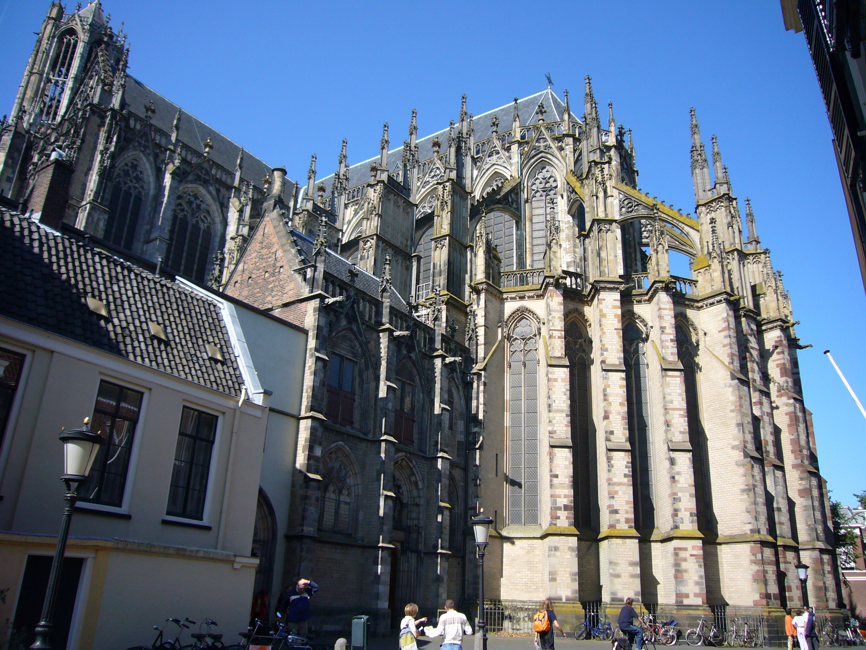 De Dom vanuit het zuidoosten